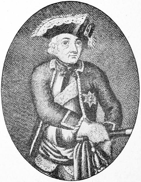 Данное изображение было использовано в статье «Вейсман, фон Вейсенштейн, Отто-Адольф, барон» опубликованной в пятом томе «Военной энциклопедии», который был издан книгоиздательским товариществом Ивана Дмитриевича Сытина в 1911 году в столице Российской империи городе Санкт-Петербурге.